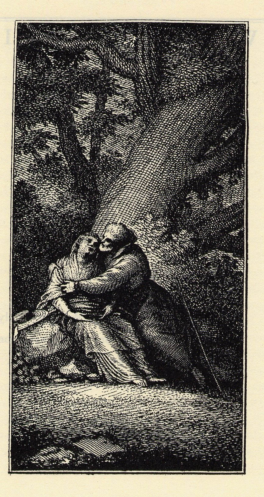 Titelbild zum zweiten Teil von Johann Karl Wezel: Belphegor oder die wahrscheinlichste Geschichte unter der Sonne. Der Derwisch und seine Frau Lucie in ihrer Idylle in Persien